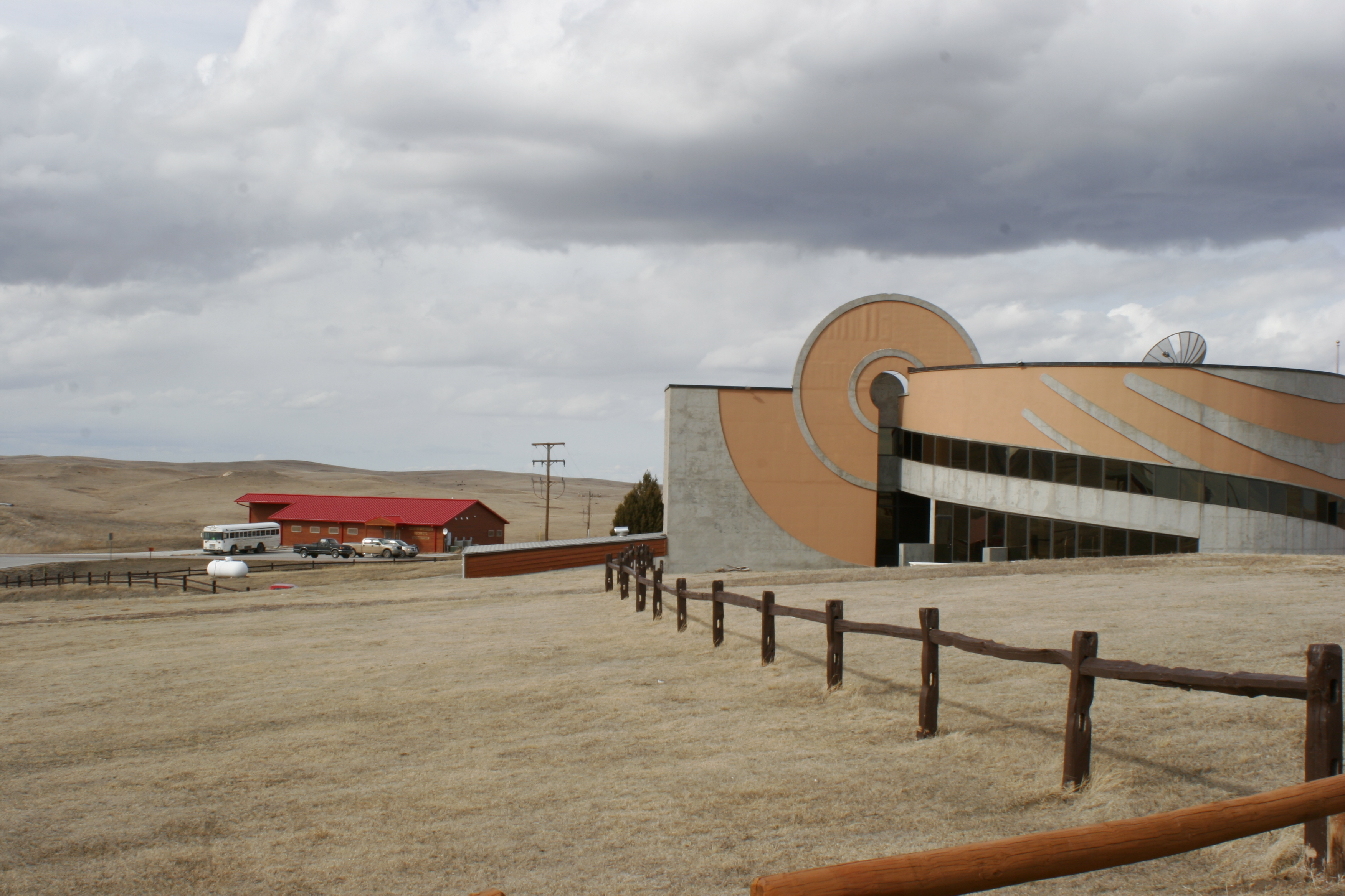 _MG_6881